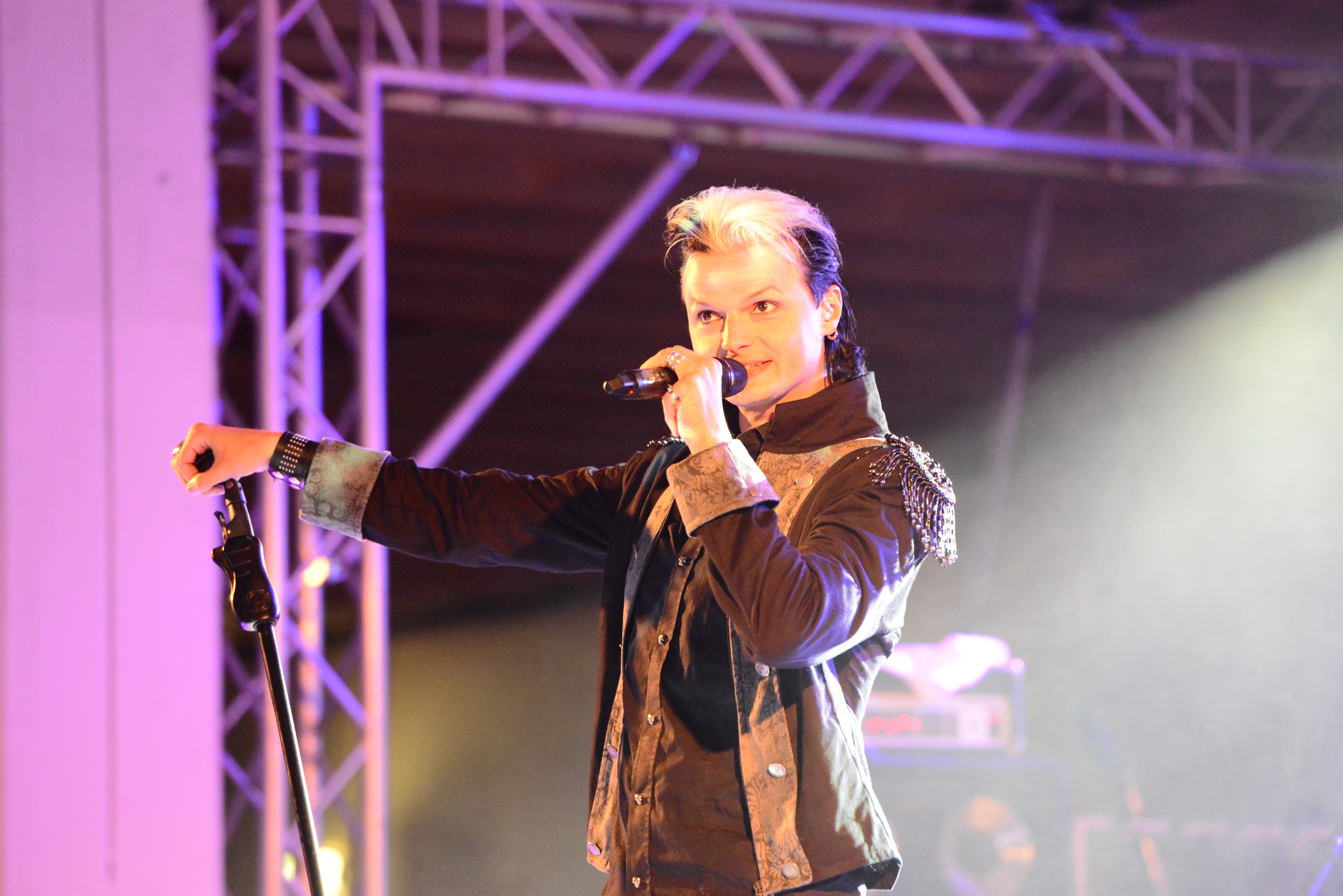 Lacrimosa, Amphi festival 2014